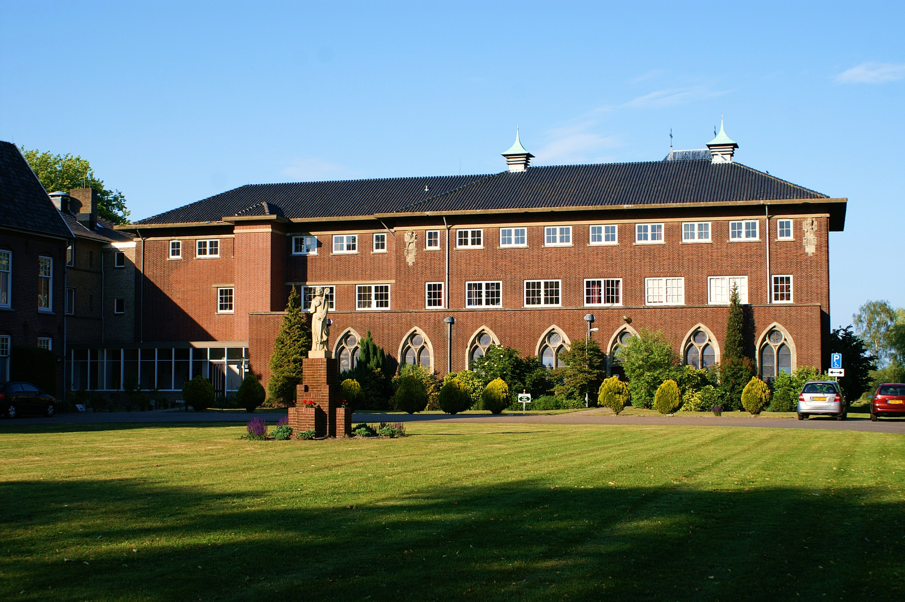 Abdij Mariënkroon, Abdijlaan 6 Nieuwkuijk